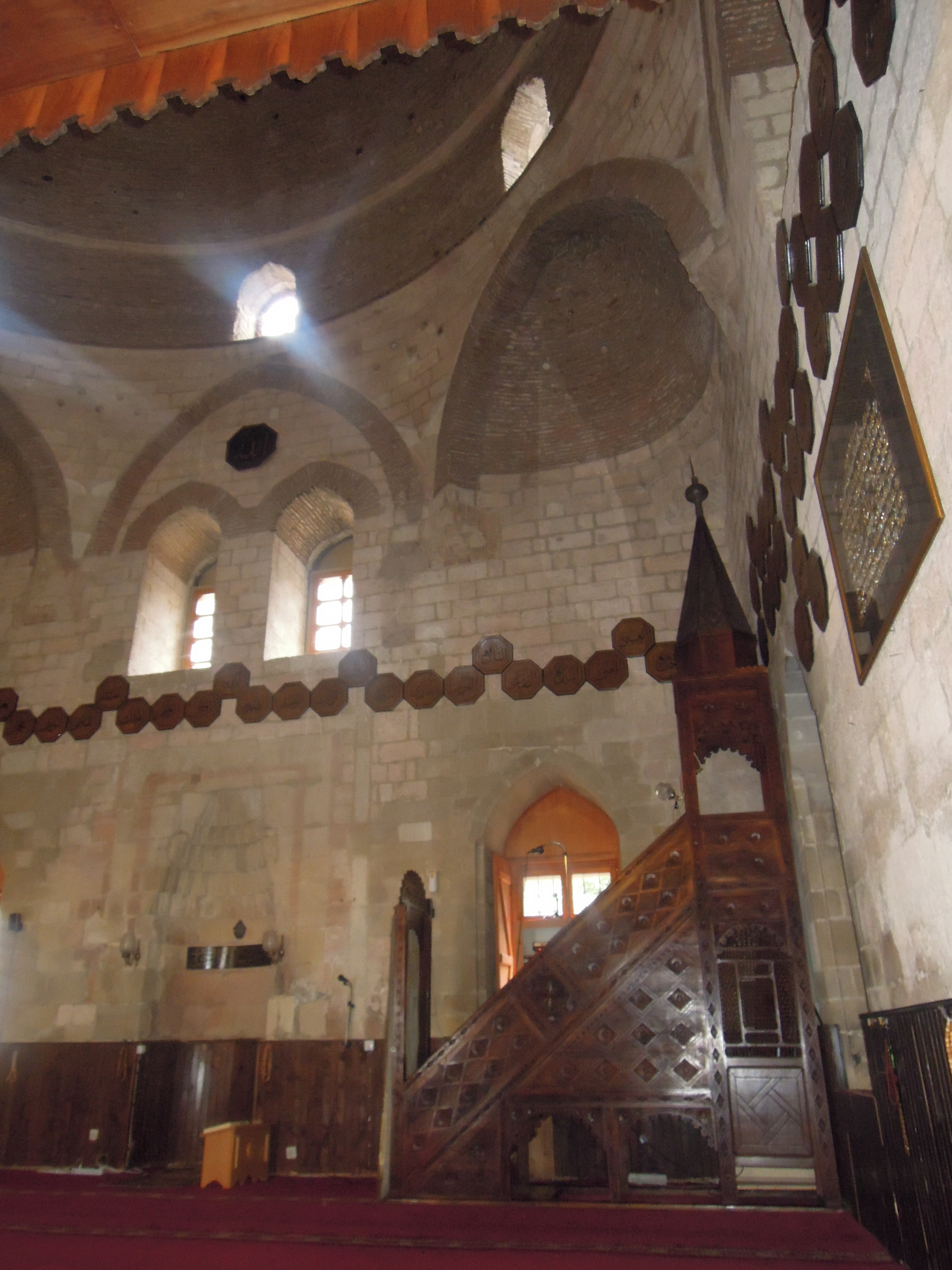 Бајракли џамија је саграђена око 1575. године, као једна од 273 џамија, колико их је у турско доба било у Београду.